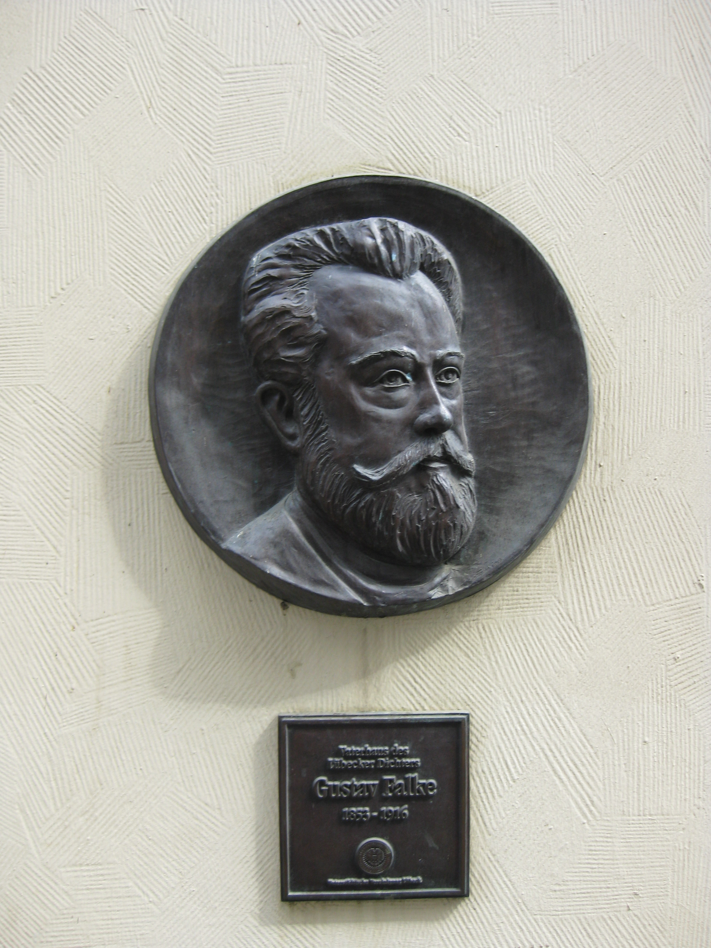 Erinnerungstafel am Elternhaus des Schriftstellers Gustav Falke Ecke Breites Straße/ Fleischhauerstraße (Haus der Adler-Apotheke).